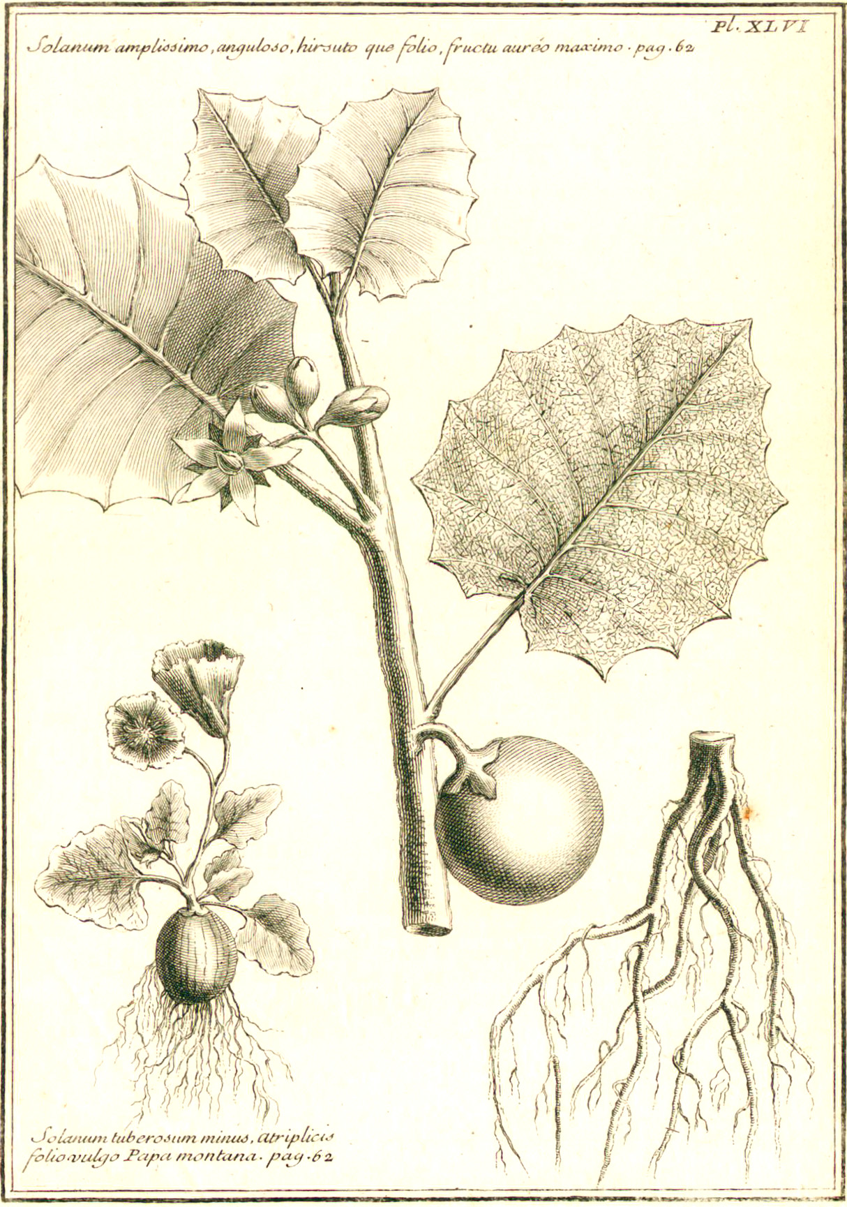 "Solanum amplissimo anguloso hirsuto que folio". In: "Journal des Observations Physiques, Mathematiques et Botaniques, faites par l'ordre du roy sur les côtes orientales de l'Amérique méridionale & aux Indes occidentales. Et dans un autre voyage fait par le même ordre à la Nouvelle Espagne & aux Isles de l'Amérique. (Paris-1725)" by Louis Feuillee, (1660-1732).